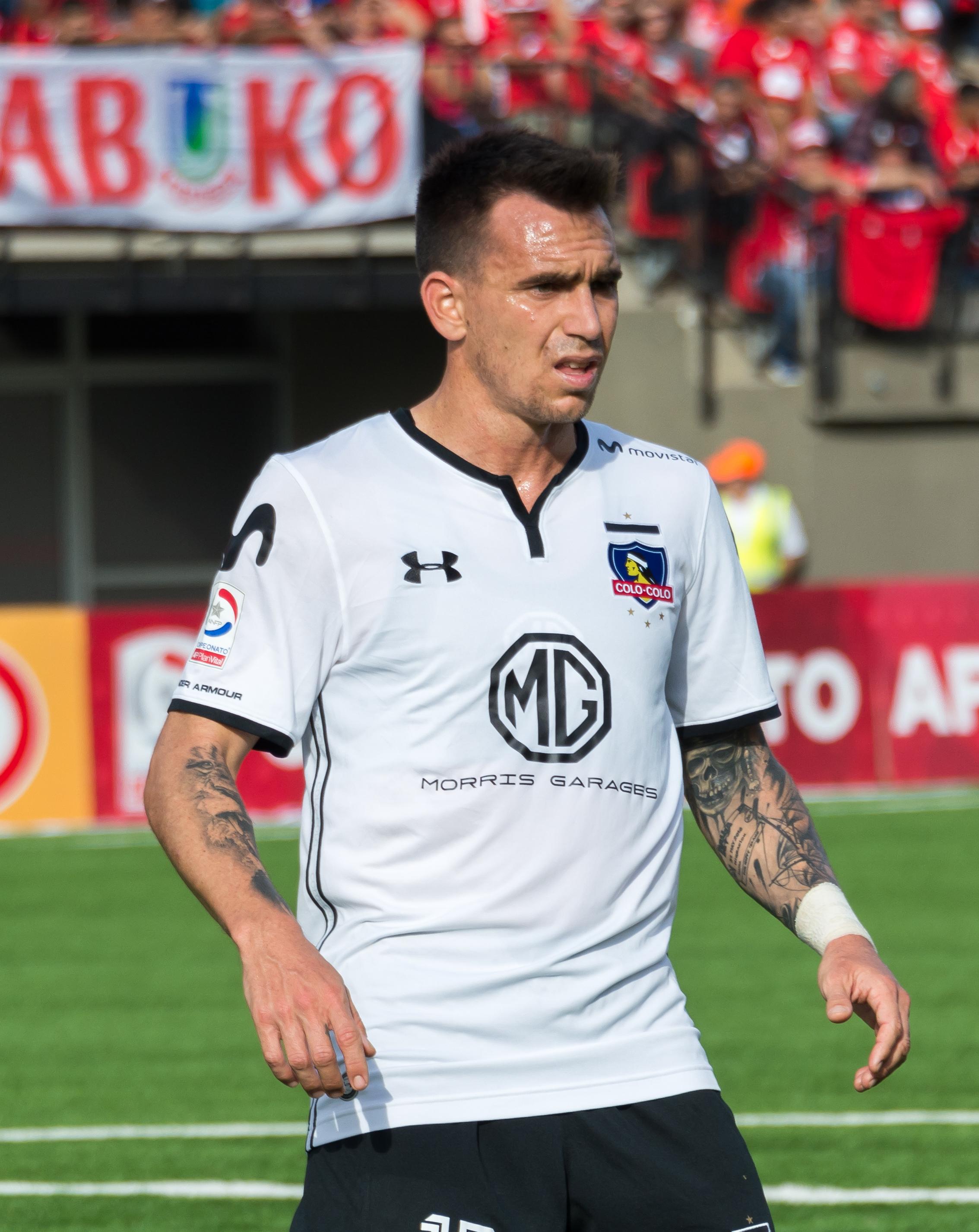 Pablo Mouche, Unión La Calera v Colo-Colo, Estadio Municipal Nicolás Chahúan Nazar, La Calera, Región de Valparaíso, Chile.